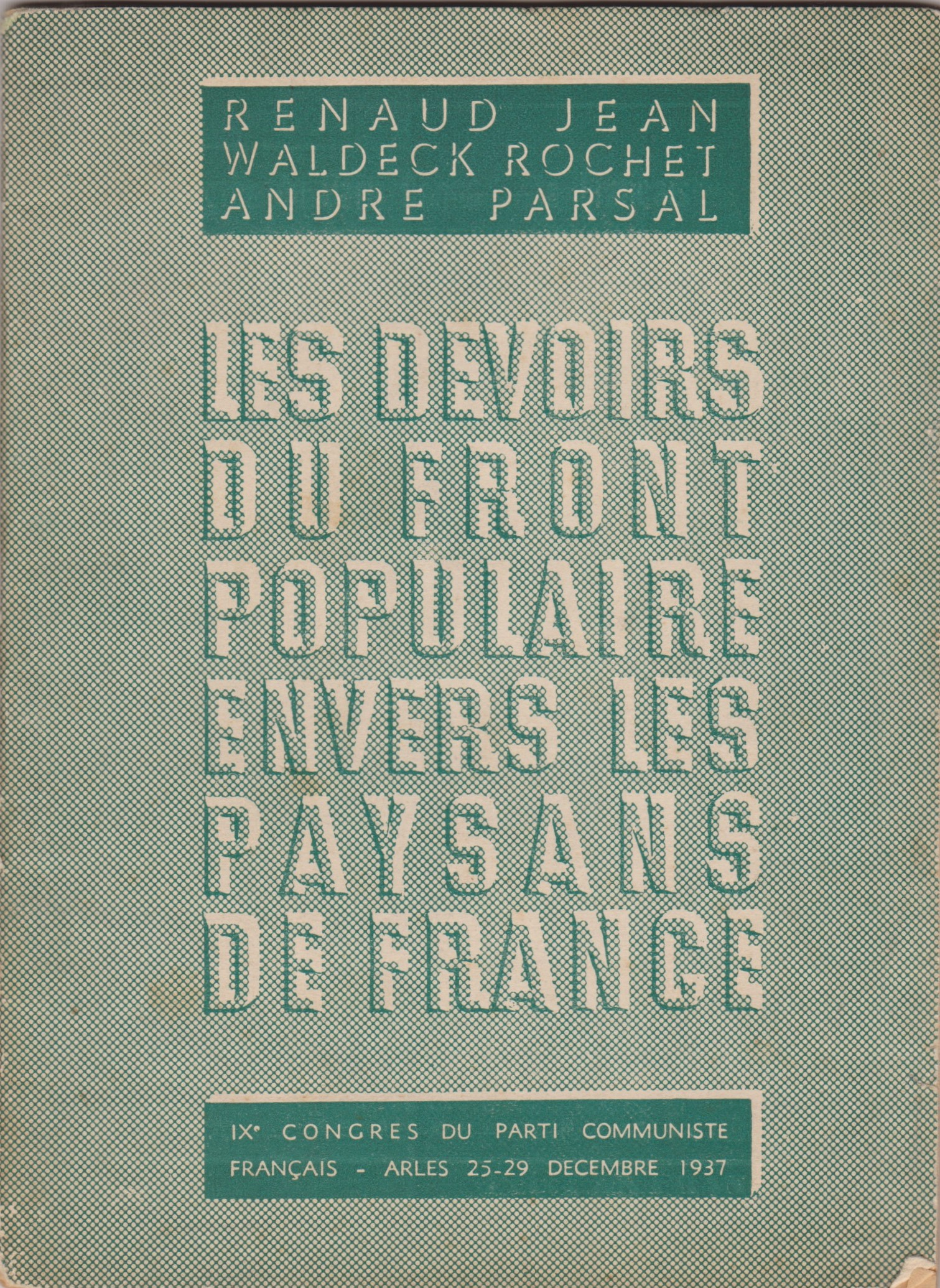 Brochure collective (format 17 x 13 cm, 64 pages), éditée lors du IXe congrès du Parti communiste français, en 1937 : rapport de Renaud-Jean, « membre du comité central, Président de la Commission de l'Agriculure à la Chambre », et interventions de Waldeck Rochet, « membre du comité central, député de la Seine » et de André Parsal, « député de la Seine ».